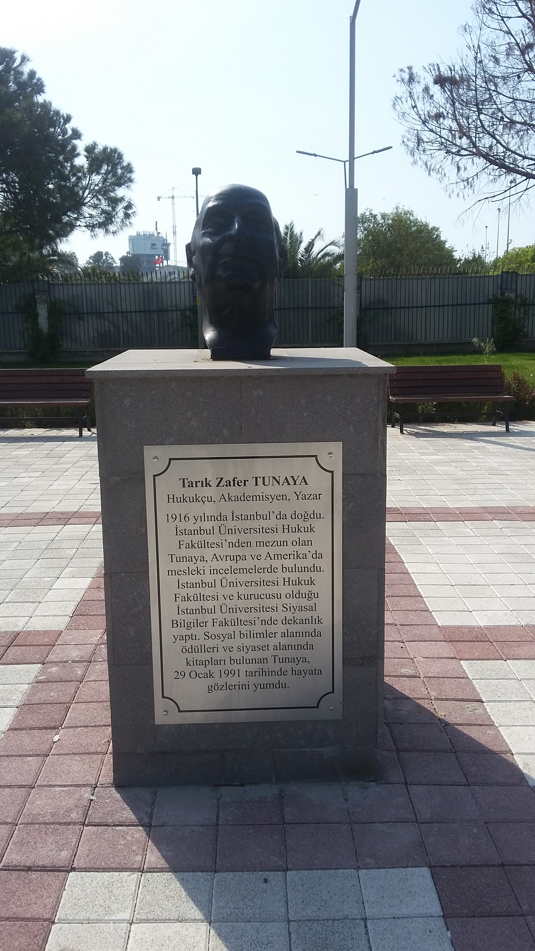 Tarık Zafer Tunaya'nın Güzelyalı semti Mehmet Ali Akman Mahallesi'ndeki büstü.